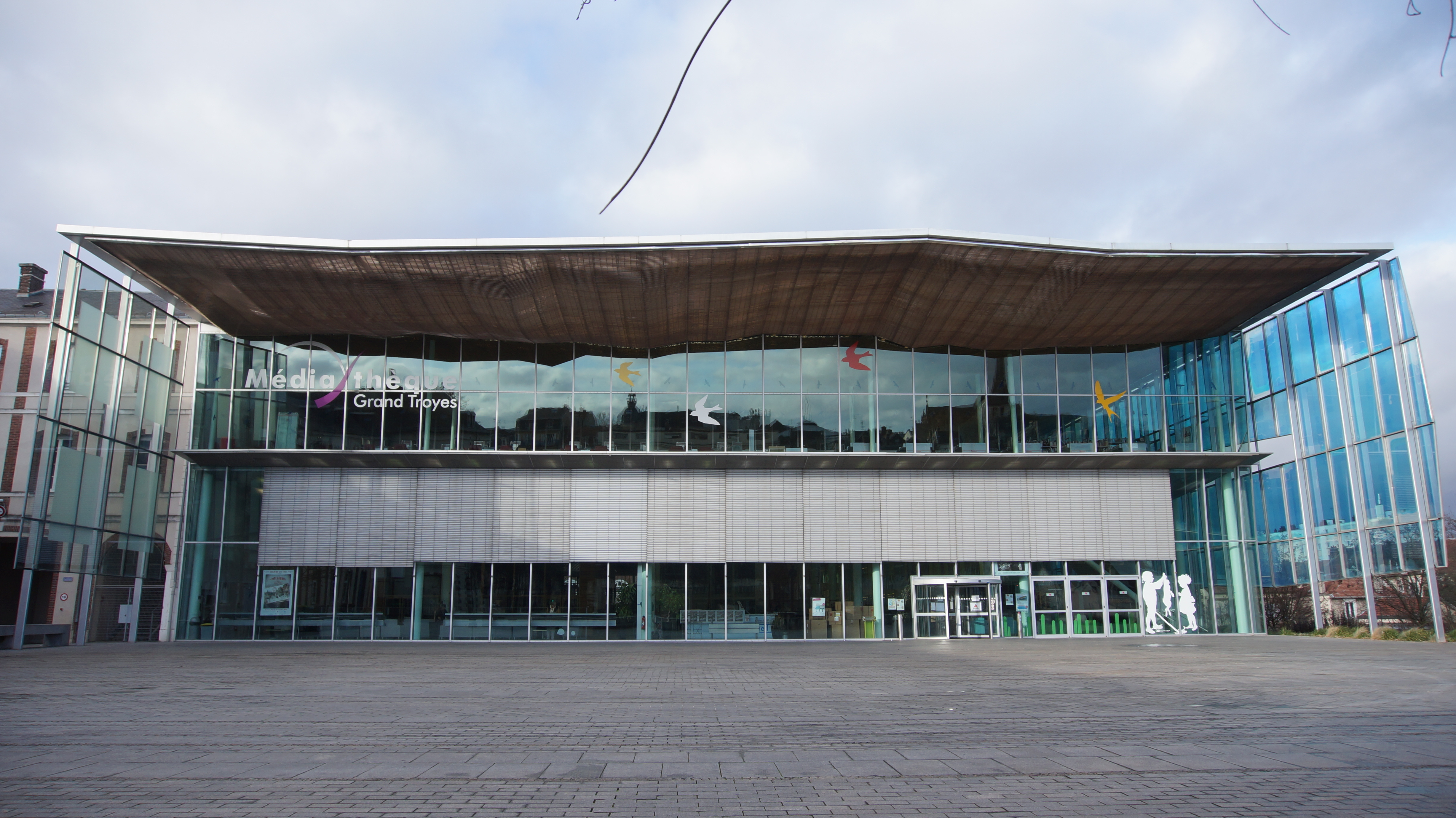 La Médiathèque du Grand Troyes, dans l'Aube.